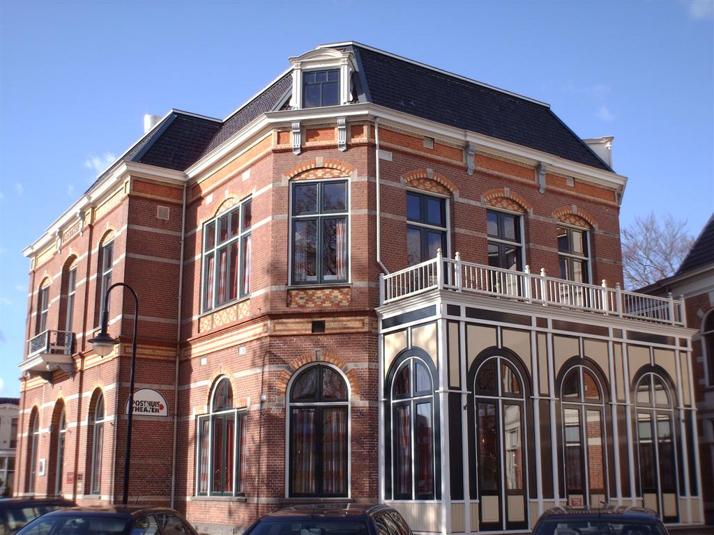 Posthuis Theater Heerenveen